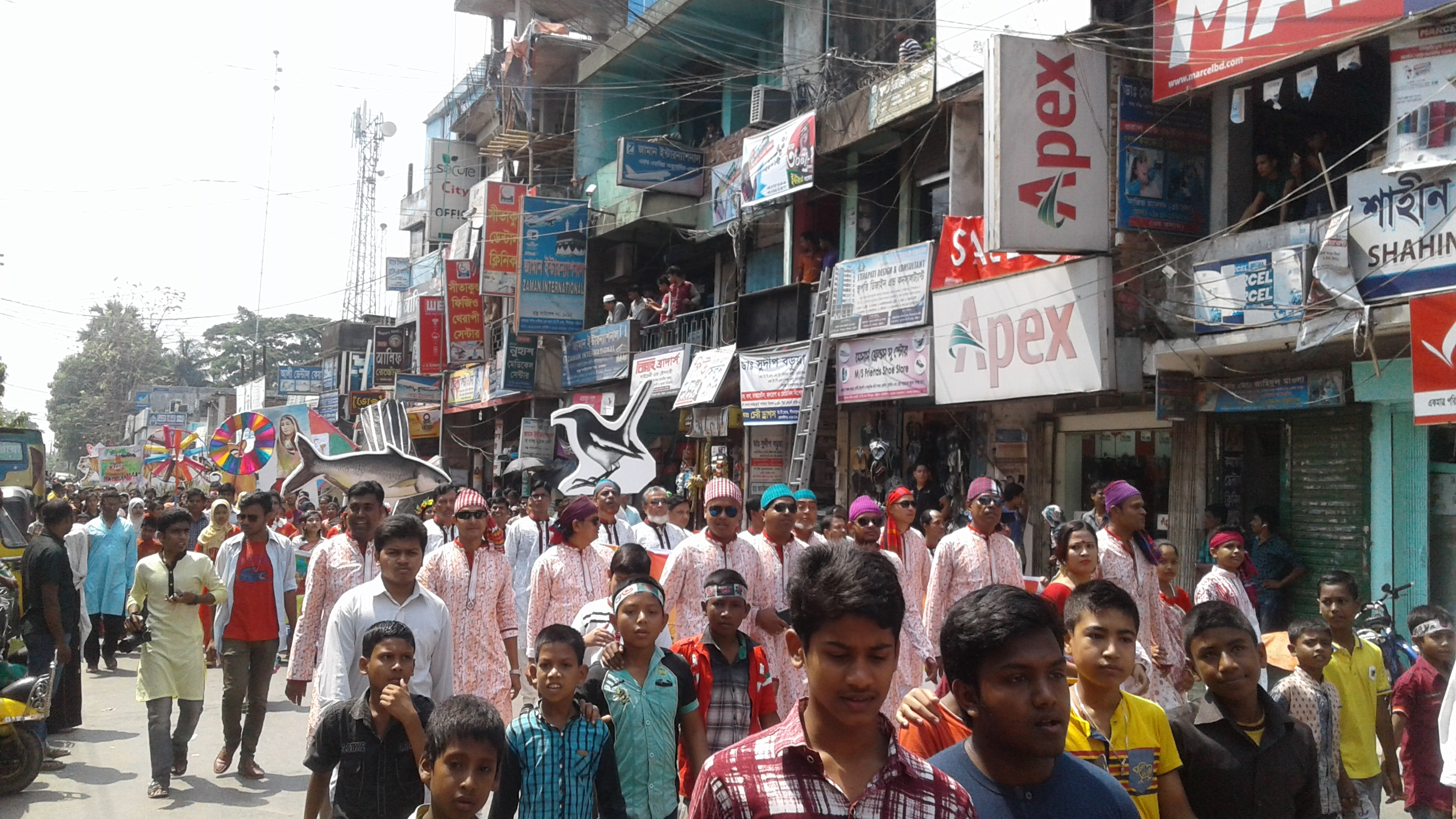 চট্টগ্রামের সীতাকুণ্ডে পহেলা বৈশাখ উদ্‌যাপন। Pohela Boishakh Celebration at Sitakunda in Chittagong City of Bangladesh. বাংলা - বাংলাদেশের চট্টগ্রাম শহরের সীতাকুন্ডে পহেলা বৈশাখ উদযাপন।